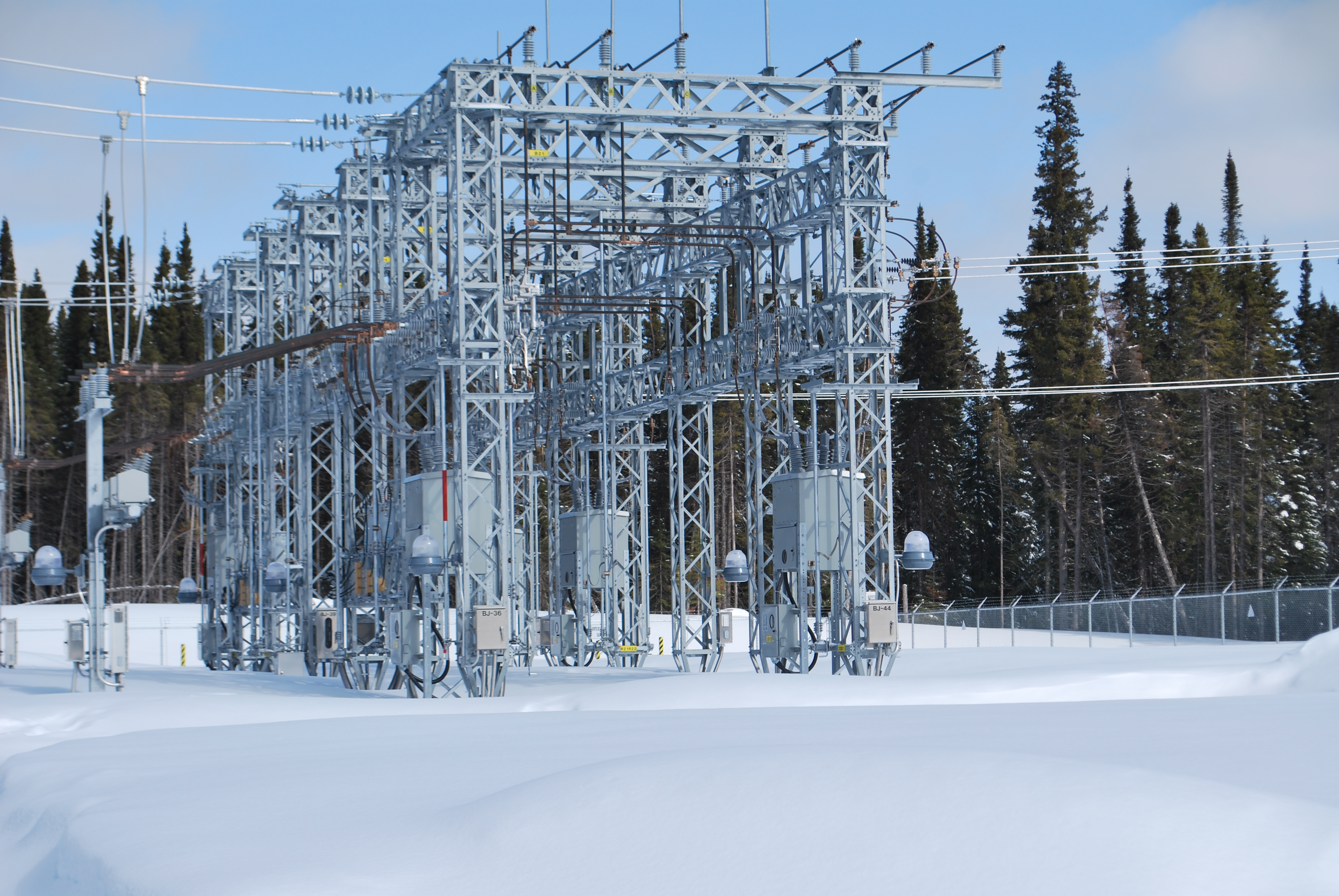 Départs de lignes de distribution à 25 kV au poste Waconichi d'Hydro-Québec. Le poste 161-25 kV, qui alimente la communauté crie de Mistissini dans le Nord-du-Québec, a été mis en service en 2011.